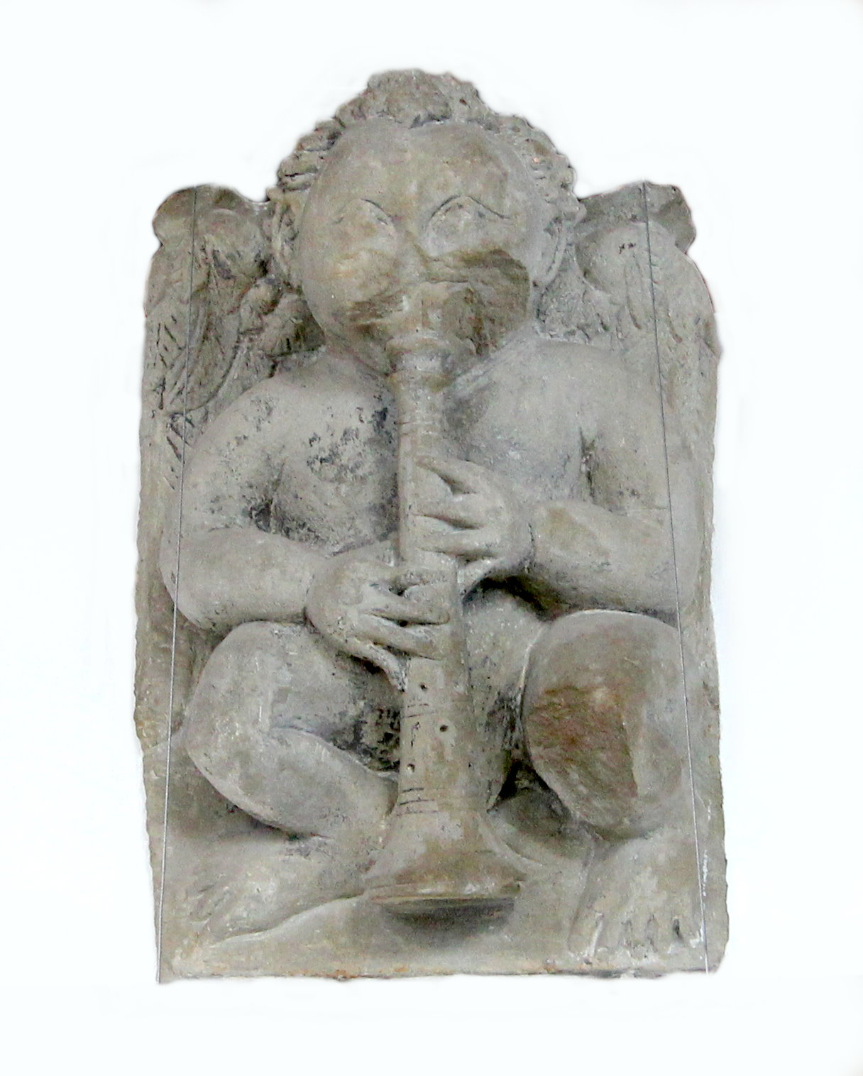 54634 Bitburg, Hauptstraße 43. Der Cobenturm war ein Wohnturm aus dem 16. Jahrhundert. Er wurde im Zweiten Weltkrieg stark beschädigt und daher 1947 abgebrochen. Architekturteile der Innenausstattung und der Fassadenreliefs befinden sich heute im Kreismuseum Bitburg-Prüm, im Rathaus und im Eingangsbereich der Stadthalle/Bitburger Markenerlebniswelt. Aufnahme von 2018.